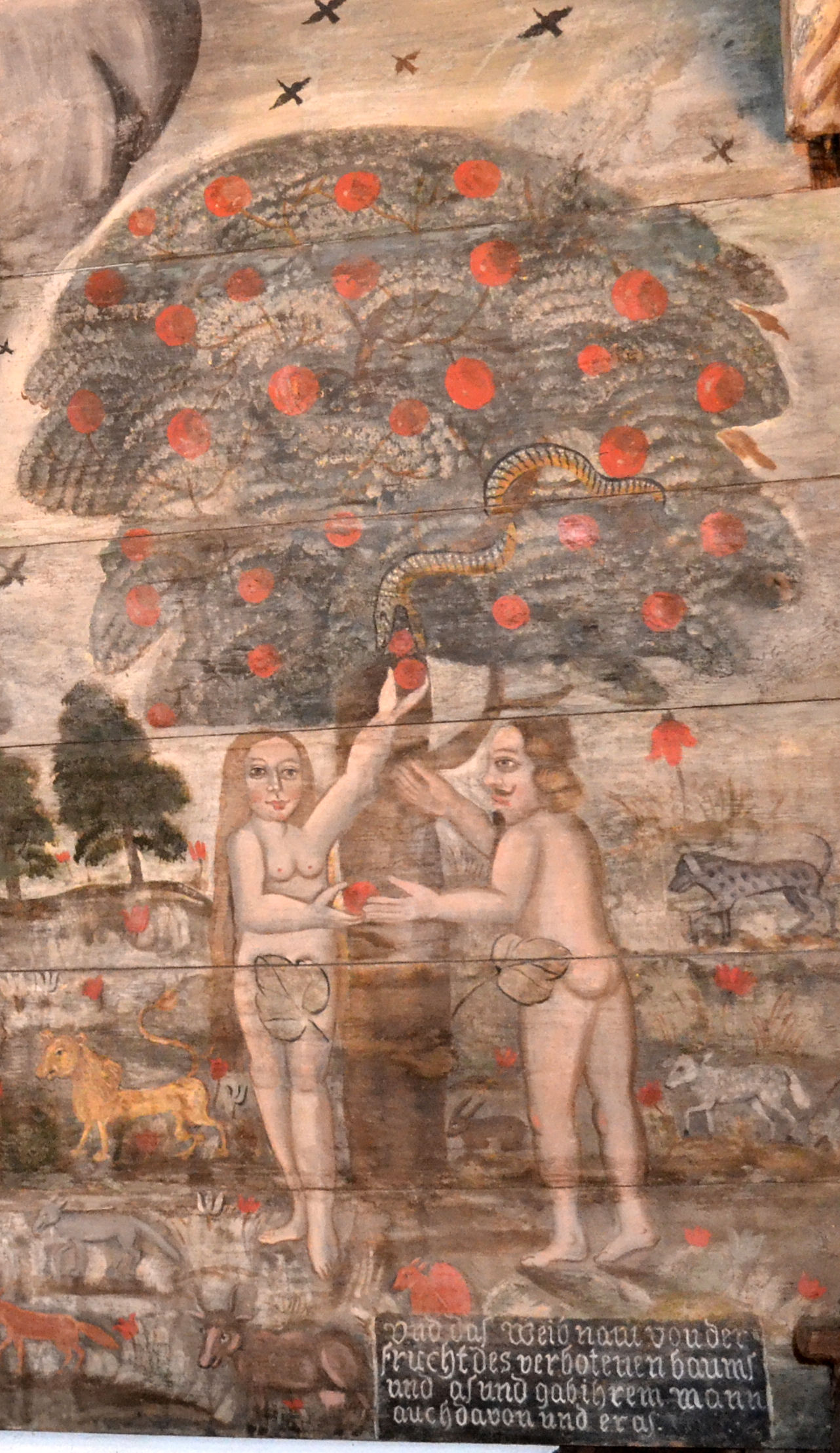 Kościół w Dzisnej (województwo zachodniopomorskie)